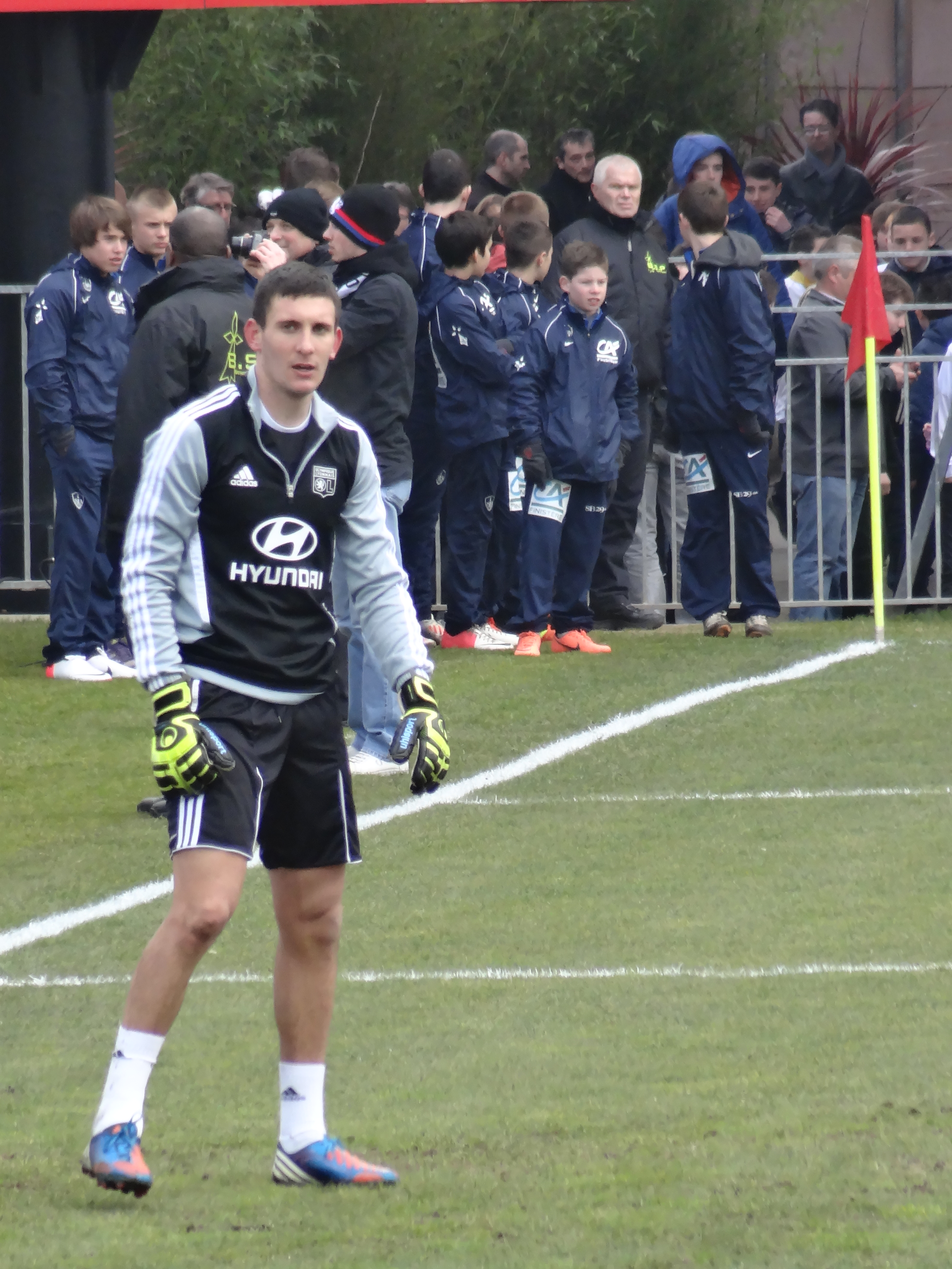 Match de football (Ligue 1) entre le Stade brestois 29 et l'Olympique lyonnais, le 3 mars 2013